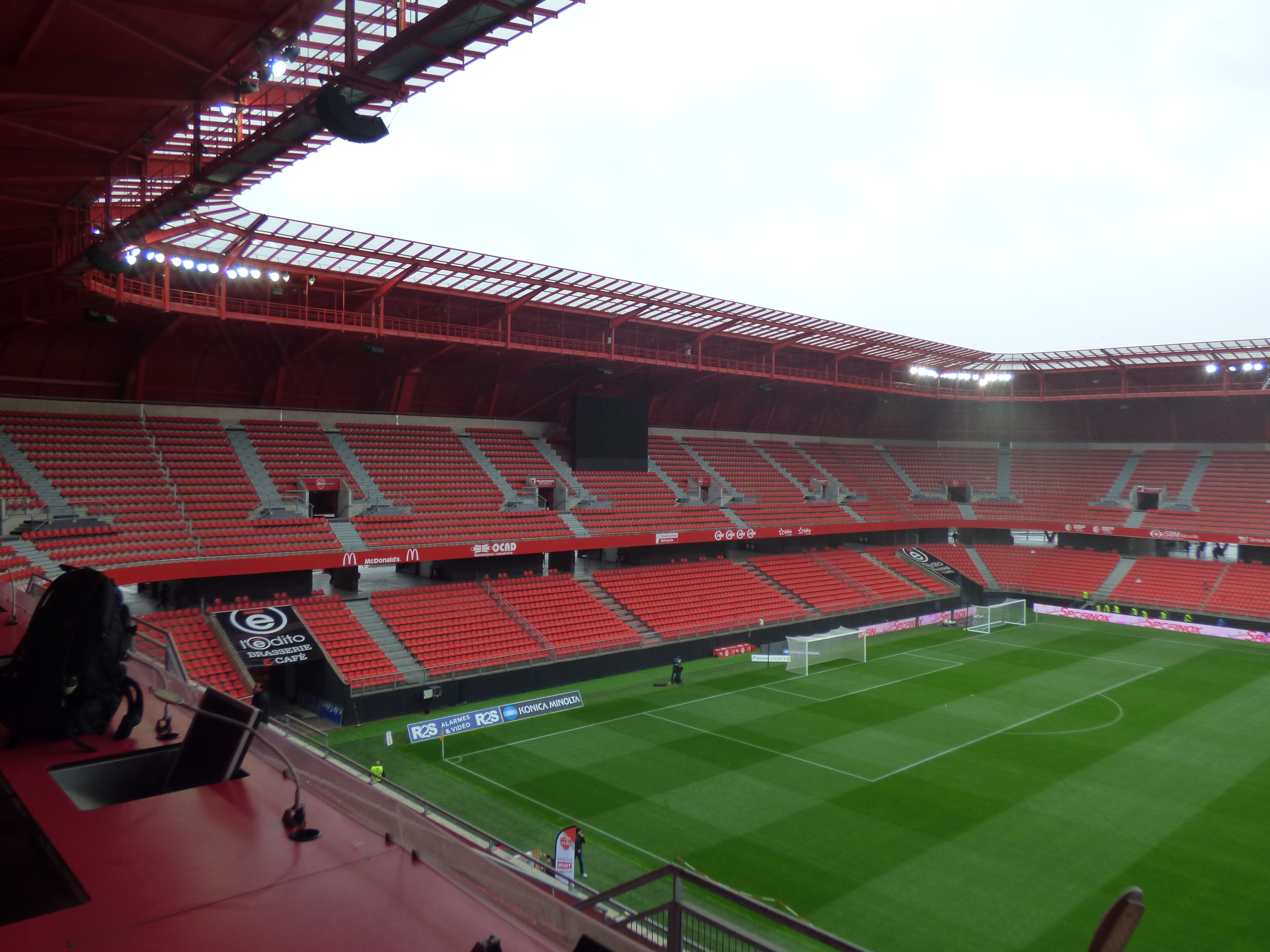 Tribune Nord du Stade du Hainaut avant le match Valenciennes FC / RC Lens, comptant pour la quatorzième journée du championnat de France de Ligue 2 2018-2019, le 10 novembre 2018.